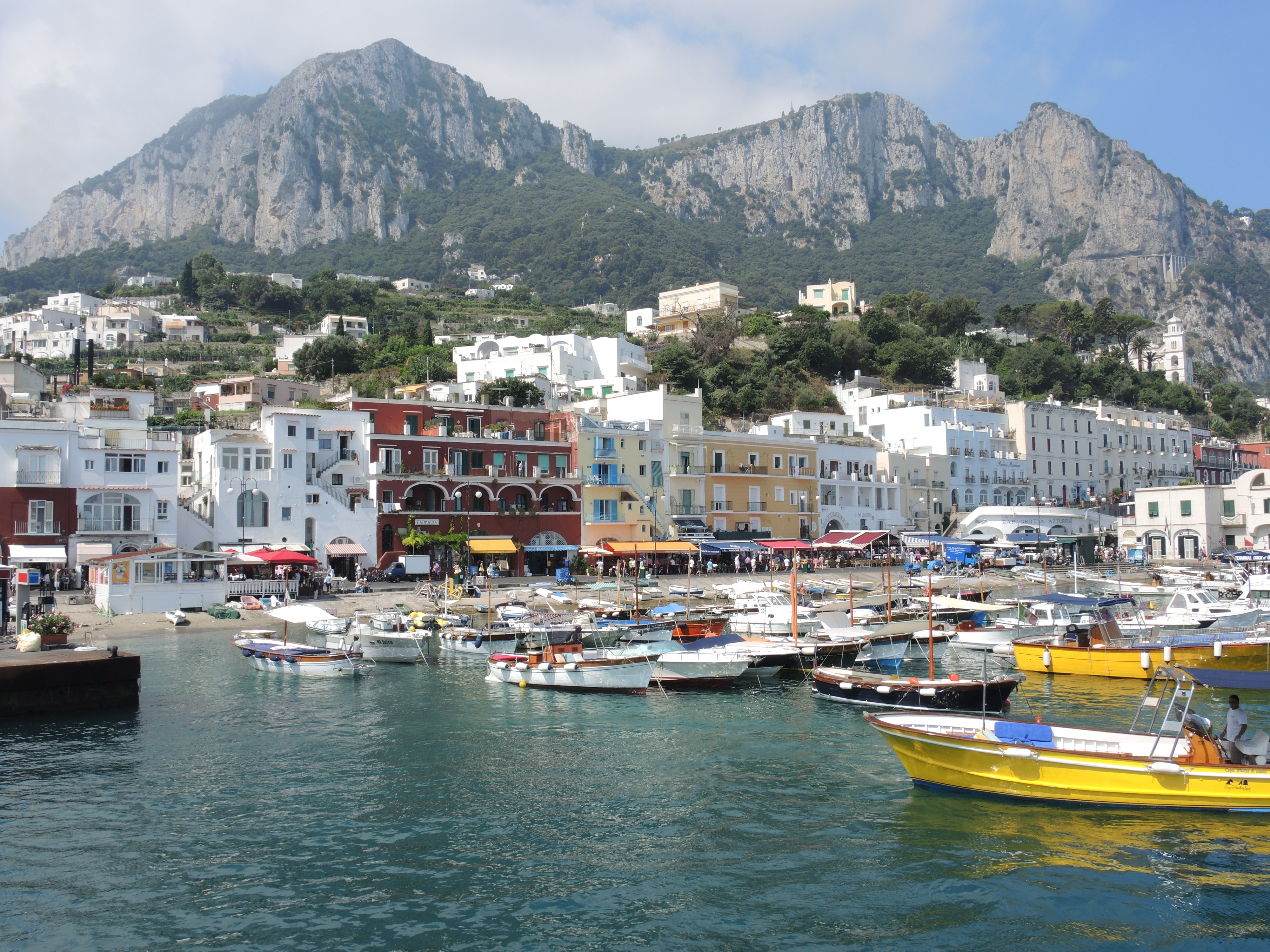 Kapri limanı